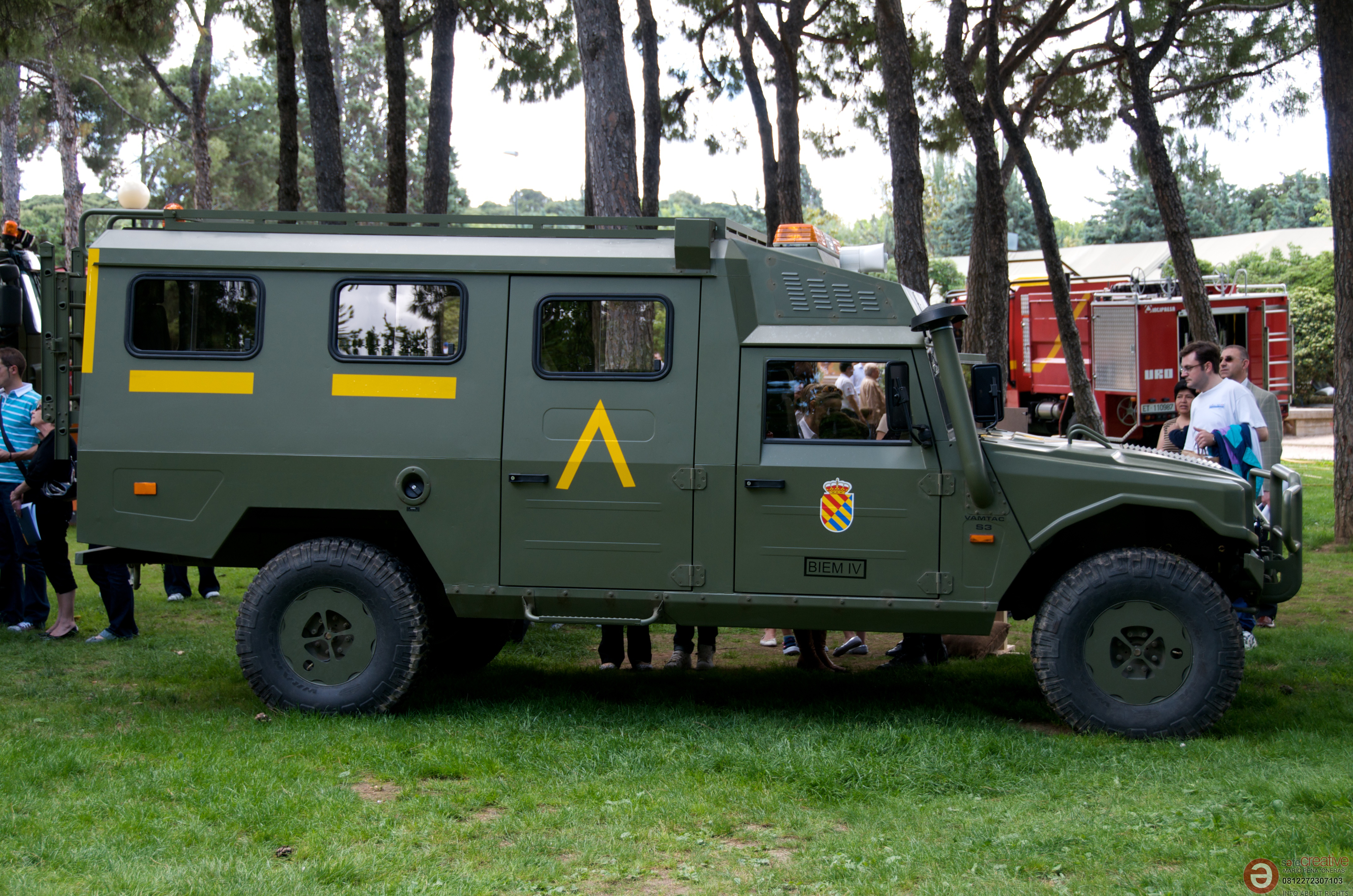 Día de la Fuerzas Armadas de España. Zaragoza.